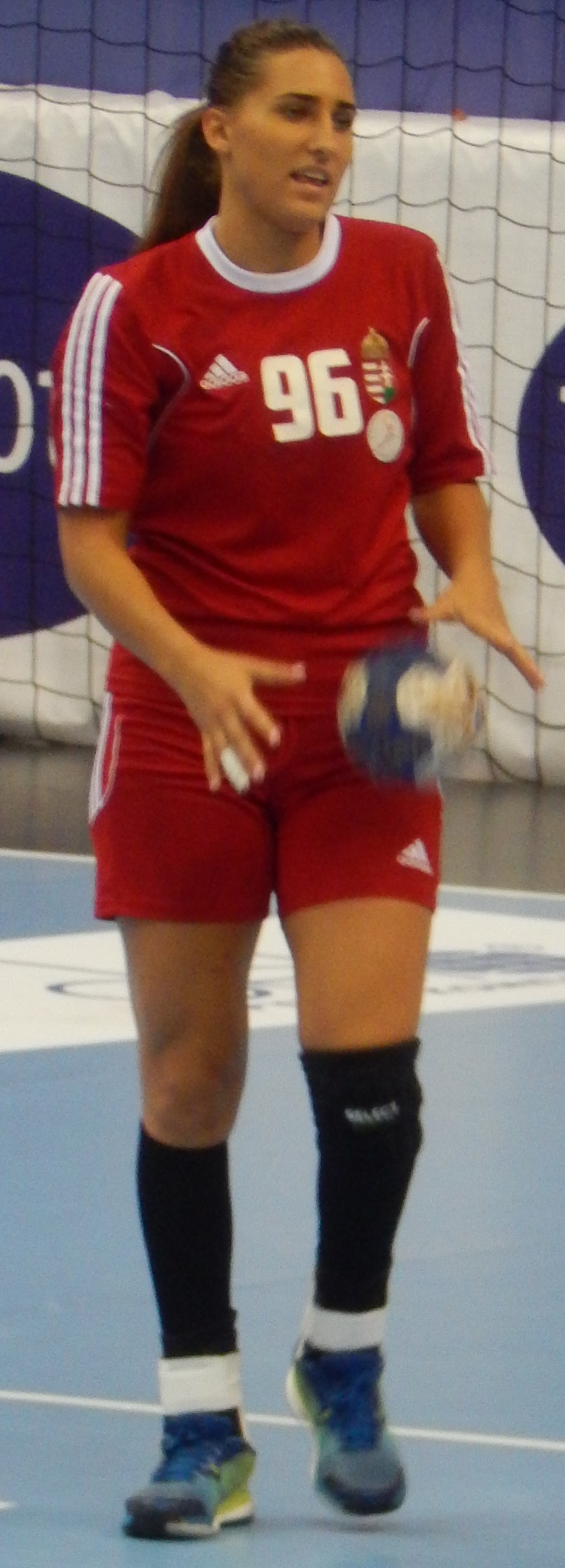 Чемпионат мира по гандболу среди девушек до 20 лет. Групповой этап, группа A. Матч Венгрия - Норвегия